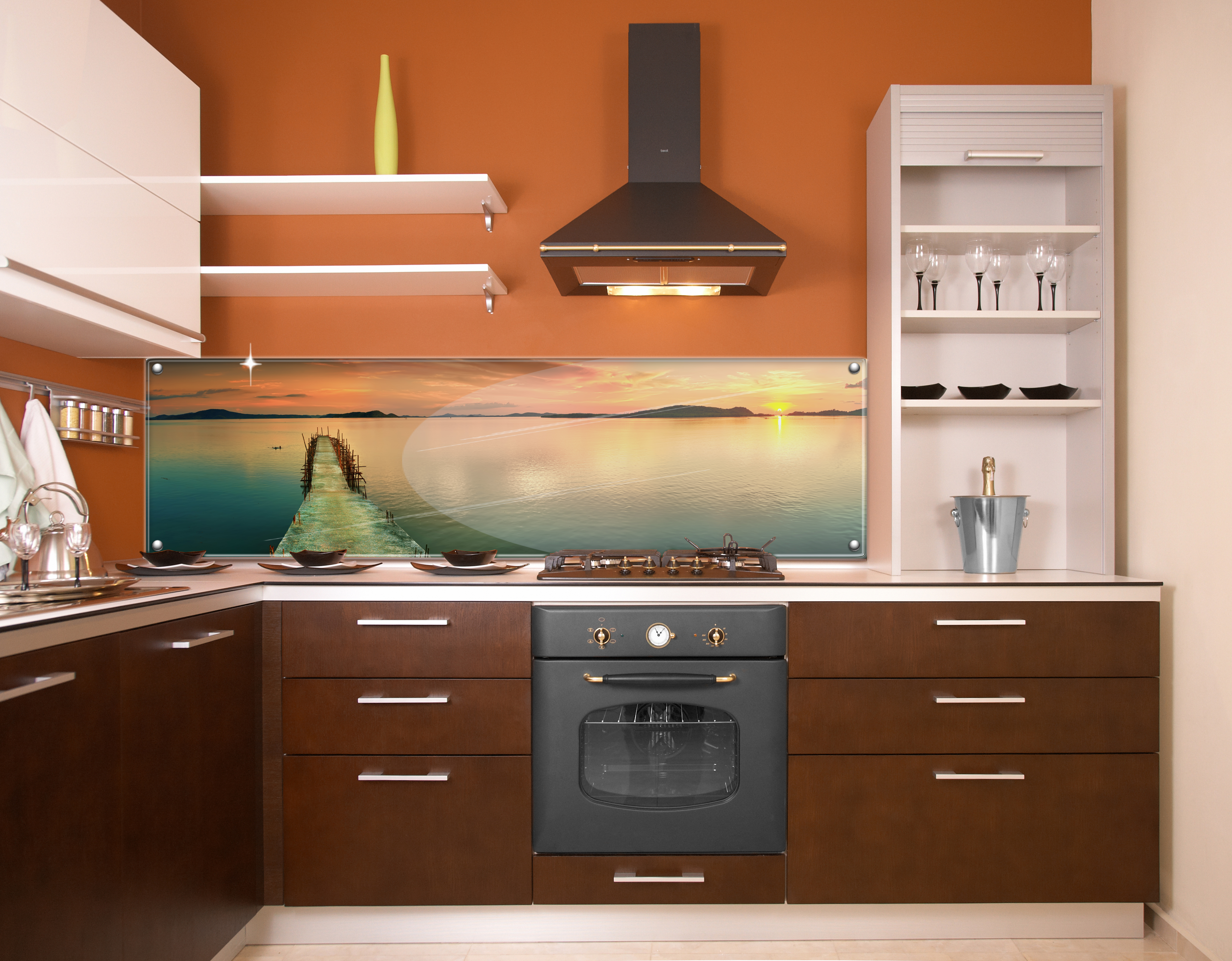 Скинали в качестве кухонного стеклянного фартука